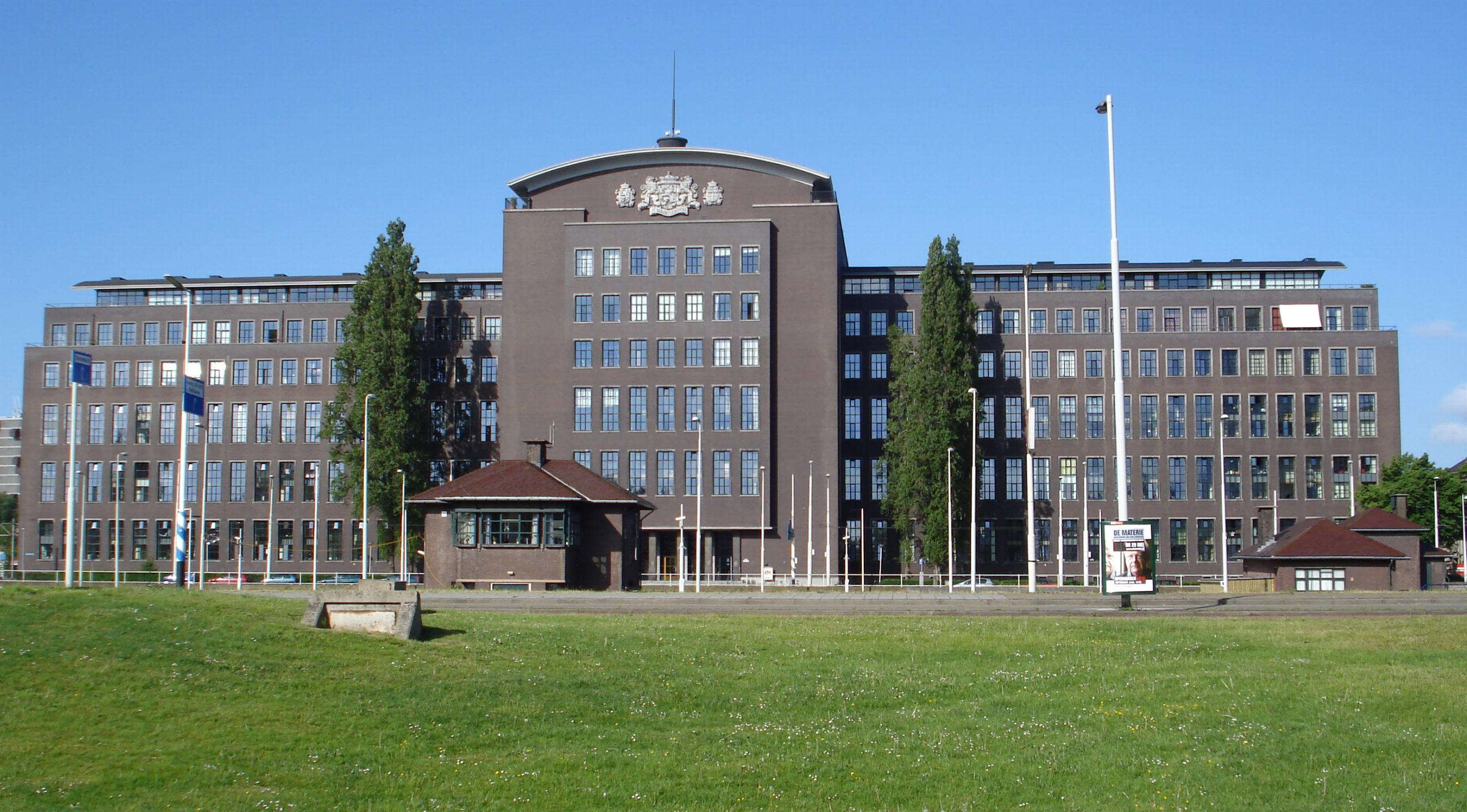 Rotterdam, belastingkantoor Puntegaalstraat. Rijksmonument